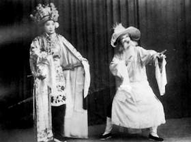 侯寶林（1917年11月29日－1993年2月4日），中国相声第六代演员，此图为1940年他在演京剧。